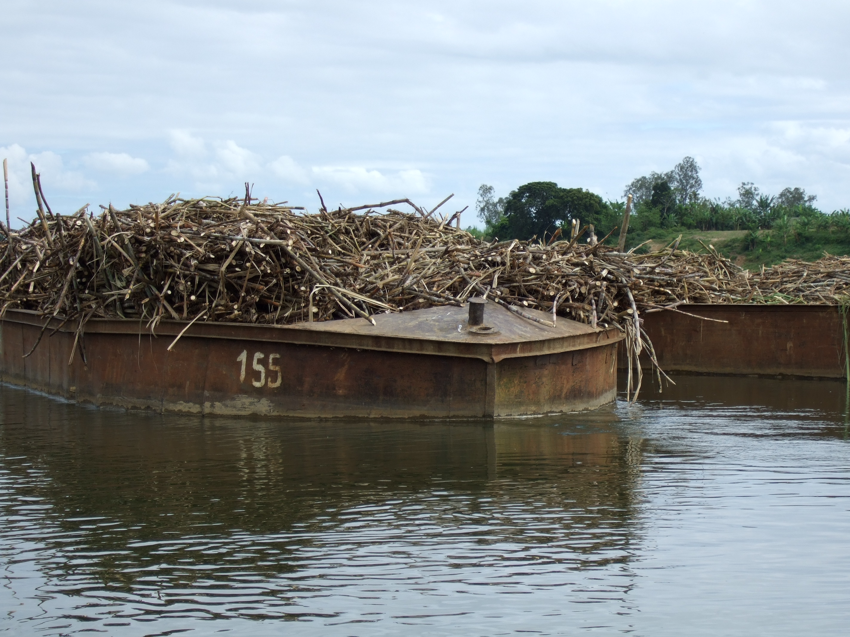 Lastschiff beladen mit Zuckerrohr Brickaville Madagaskar (sugar cane)